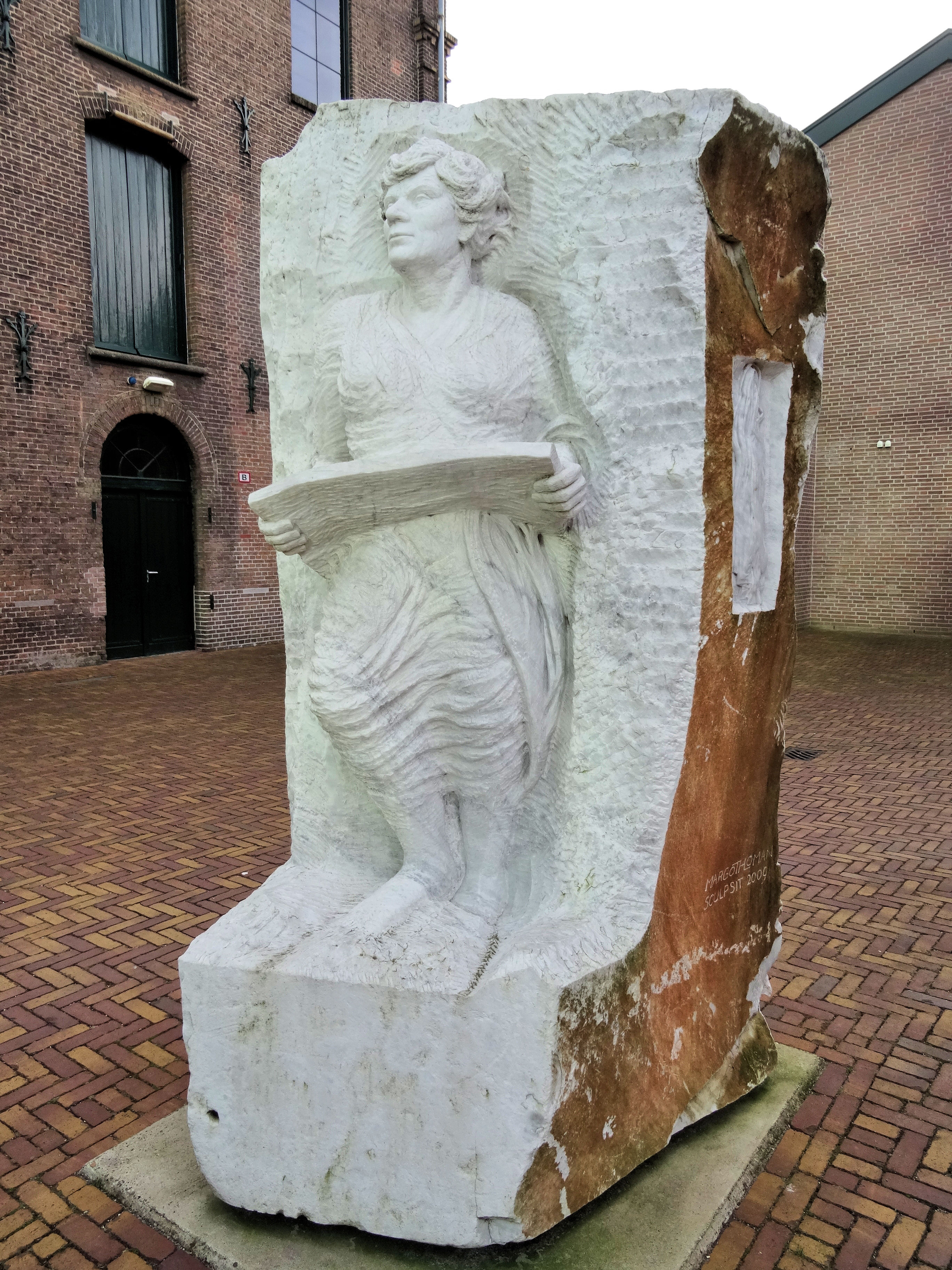 Concedo nulli (2009) van Margot Homan bij het TextielMuseum in Tilburg.